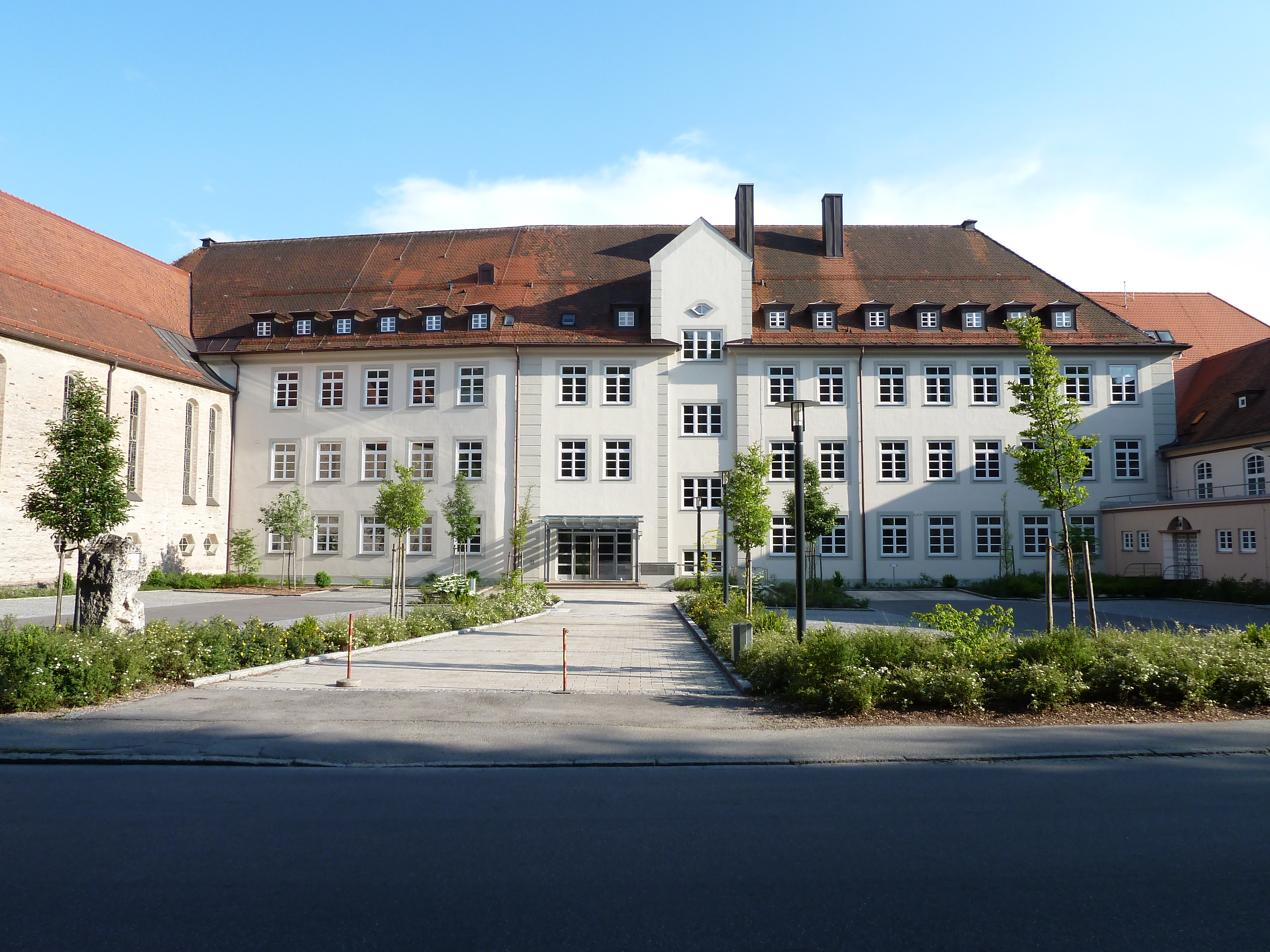 Kaufbeuren Marienschule Haupteingang